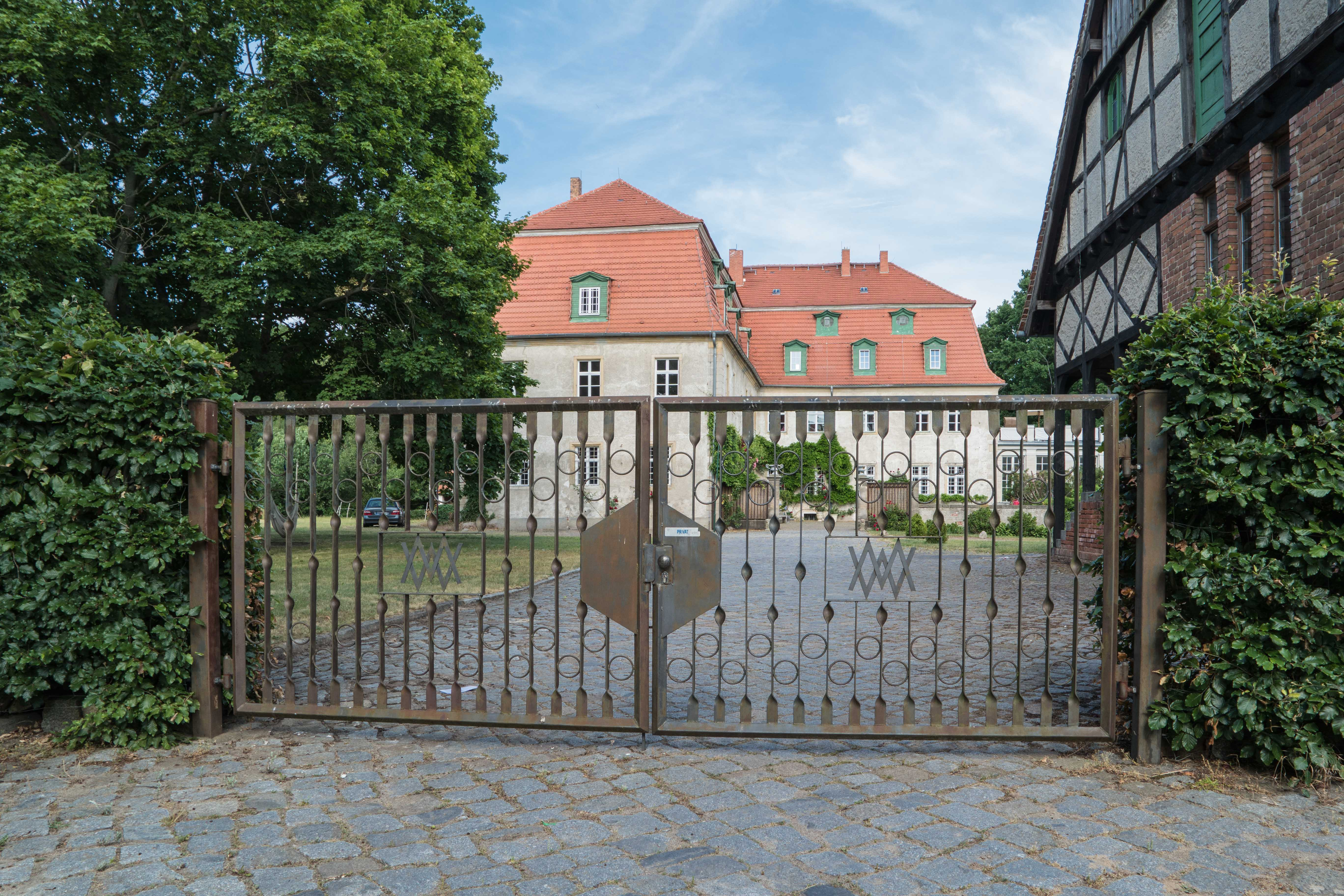 Schloss Ahlsdorf, Parkstraße 6 in Schönewalde OT Ahlsdorf